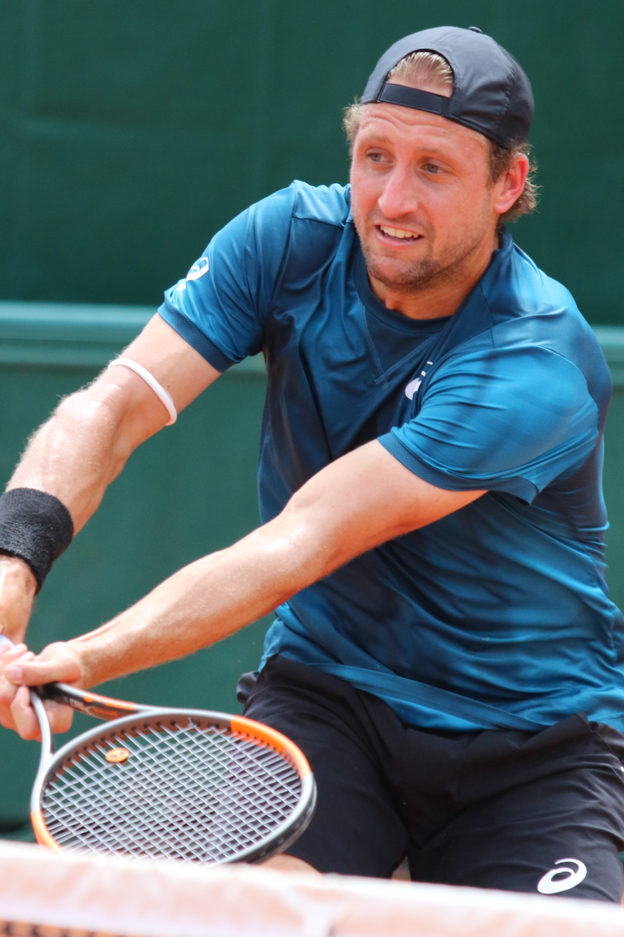 Sandgren RG18 (49)